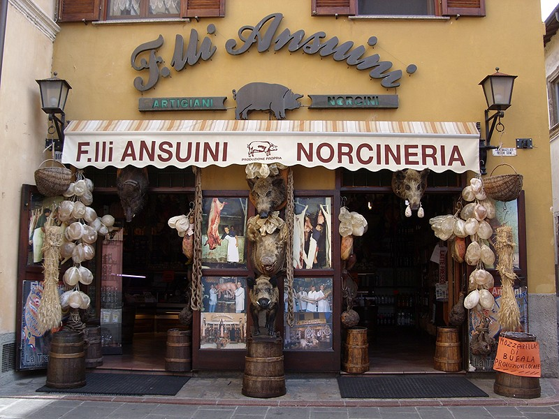 Norcia - Norcineria dei F.lli Ansuini